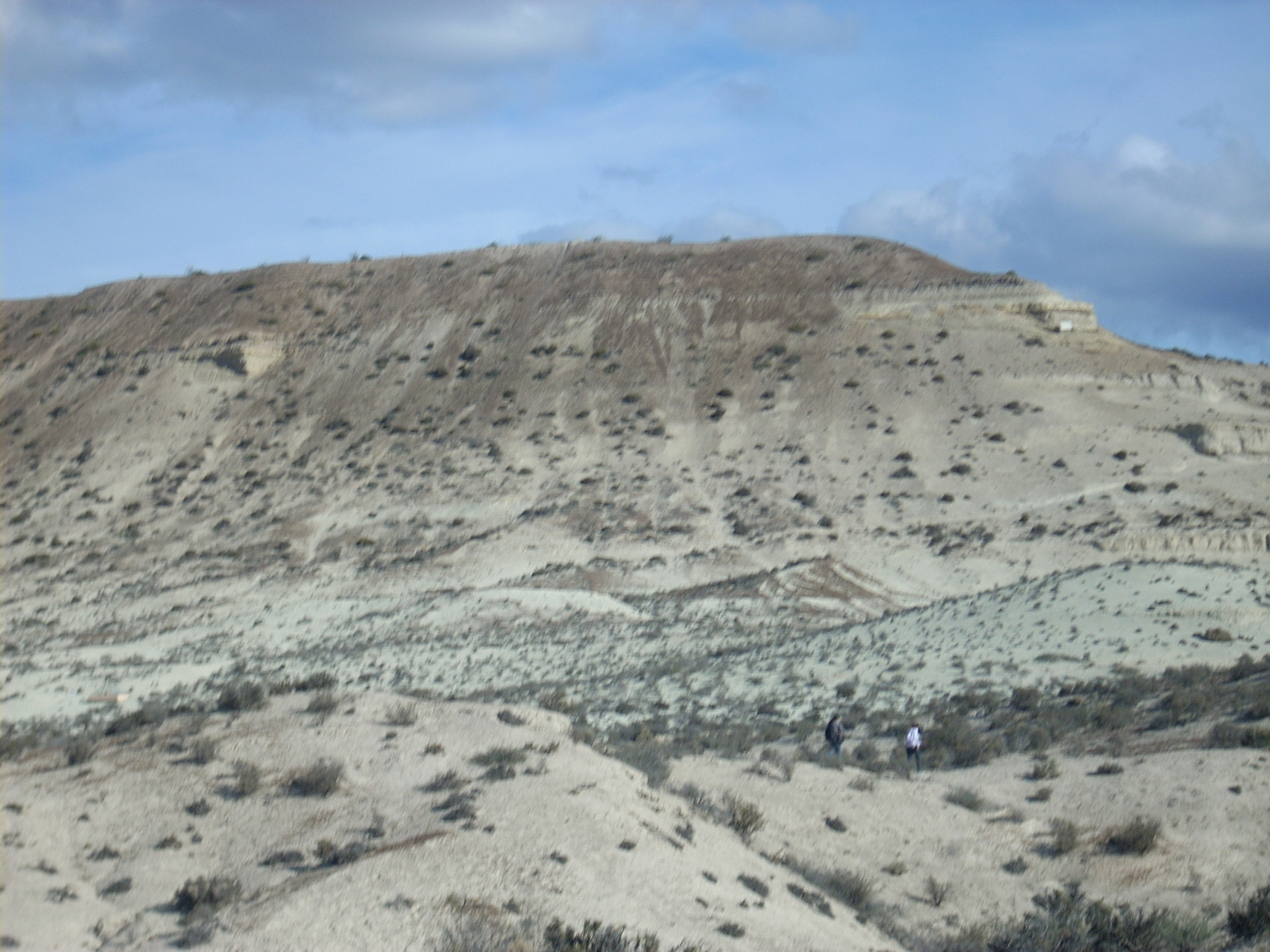 Vista del paisaje del geoparque